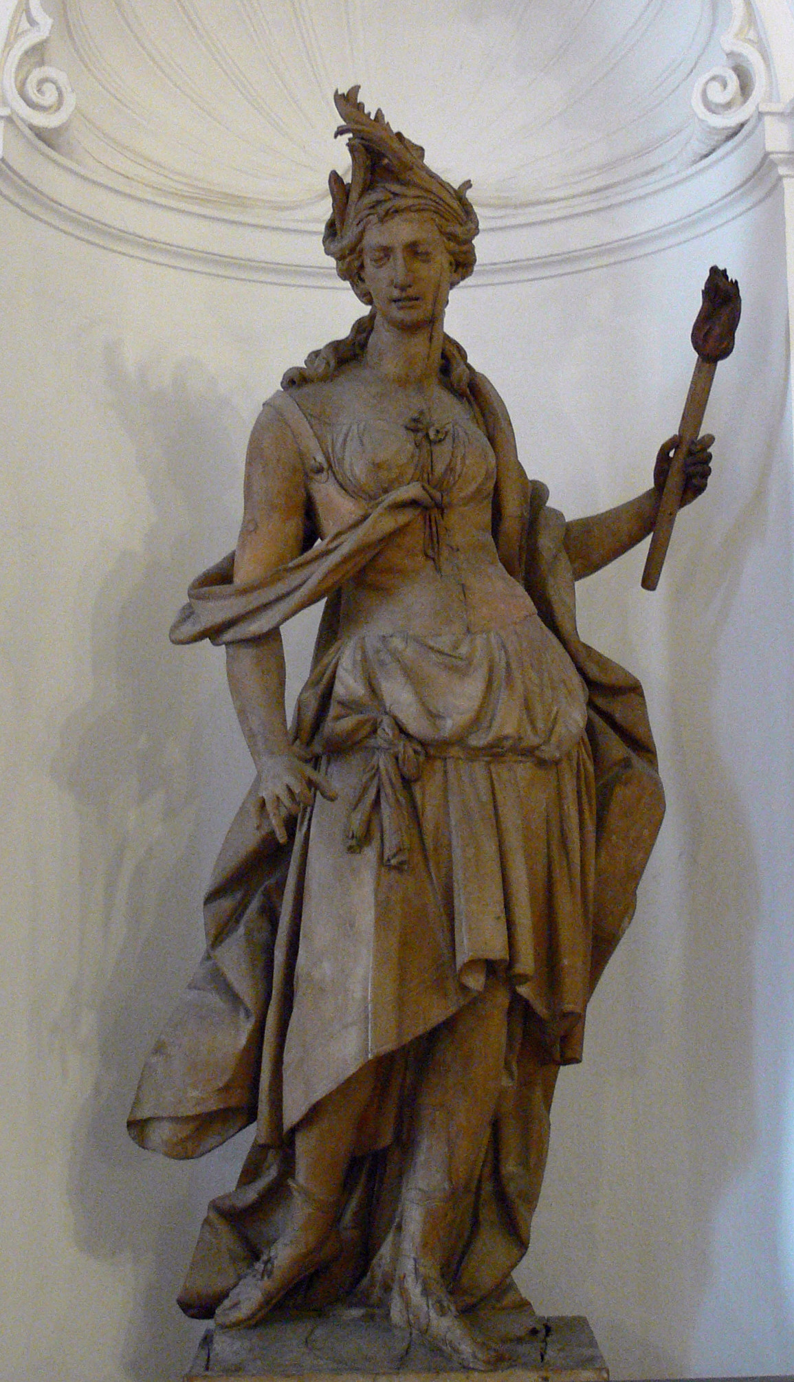 Ceres, aus dem ehemaligen Palais Törring in München, um 1772; Lindenholz, Kreidegrund mit Resten von Fassung Bayerisches Nationalmuseum München